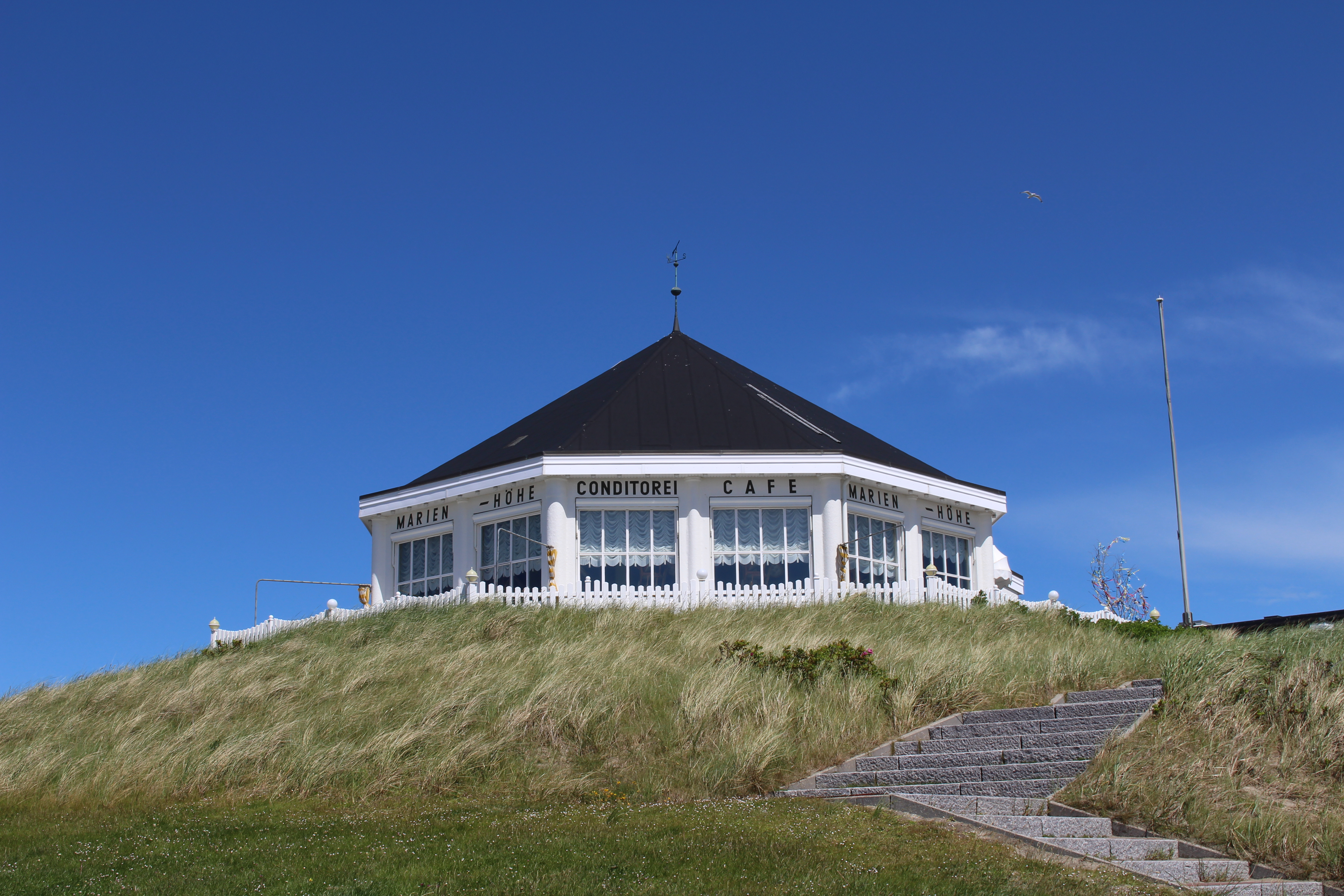 Marienhöhe am Weststrand, Norderney